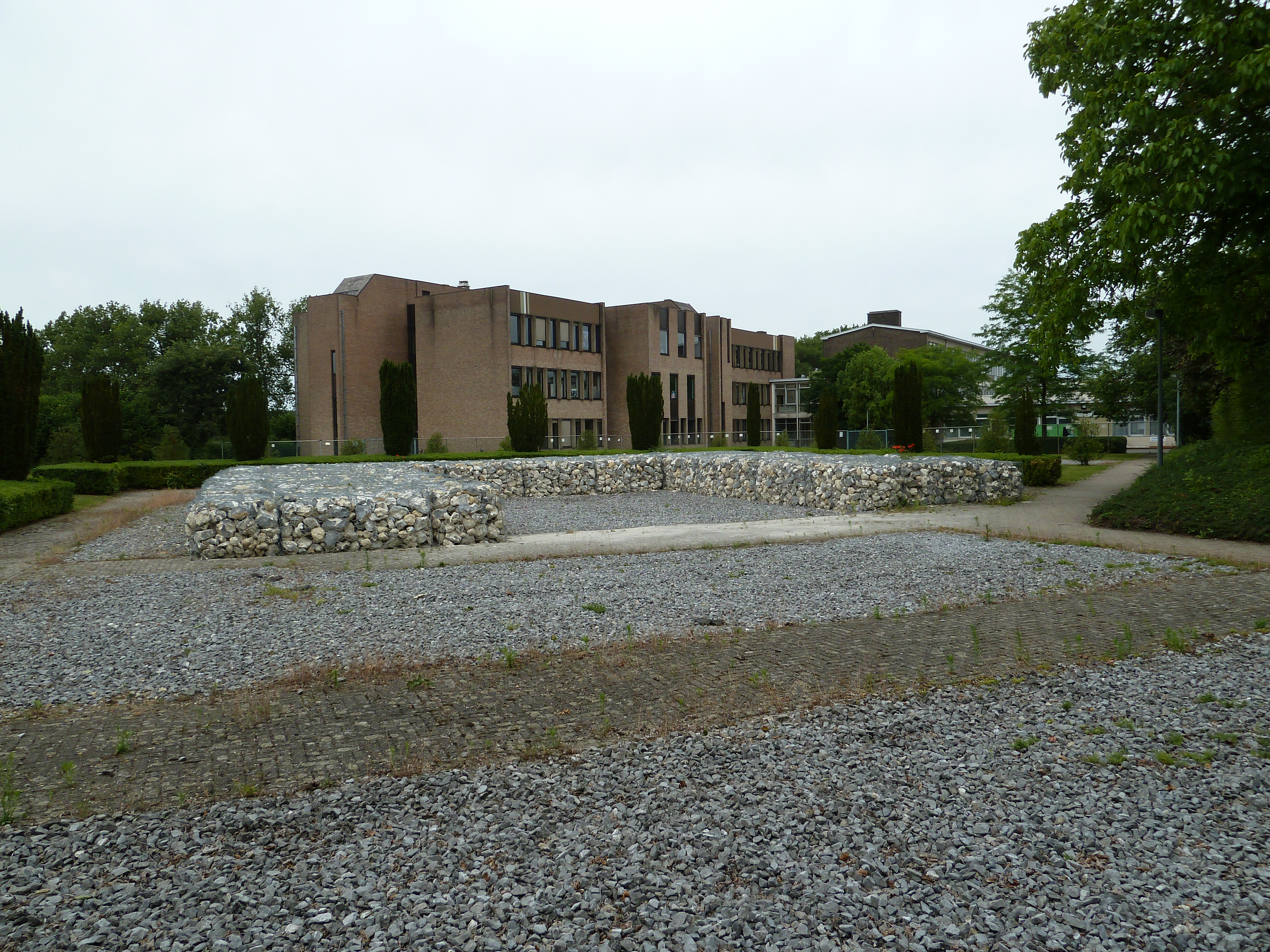 Temple gallo-romain, Tongres, Belgique